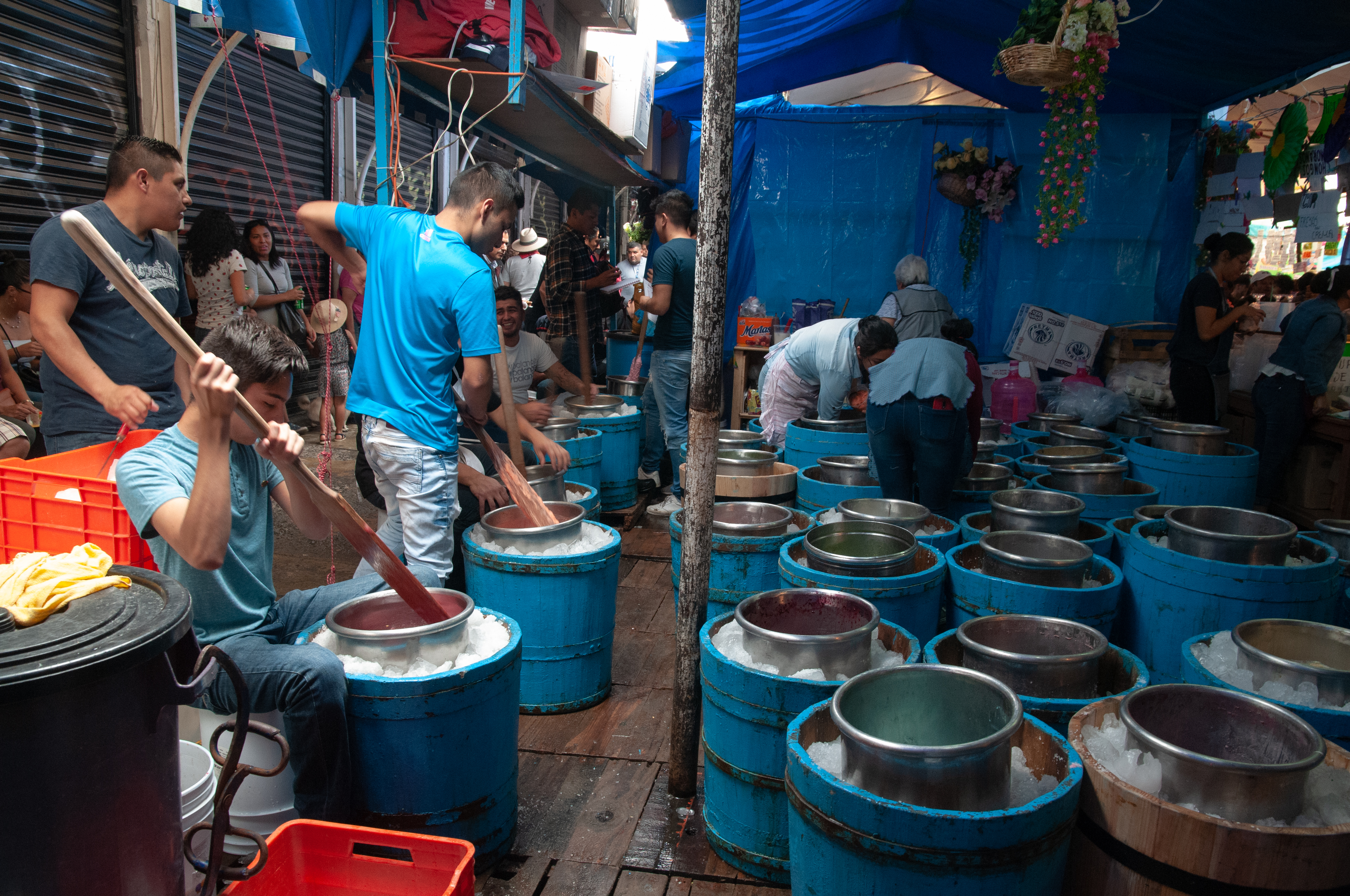 La nieve se crea en esos botes metálicos. La Feria de la Nieve es un evento anual de gran tradición en el pueblo de Tulyehualco, de la Alcaldía de Tláhuac, en la Ciudad de México. Existen decenas de puestos ofreciendo cientos de sabores diferentes de nieve.